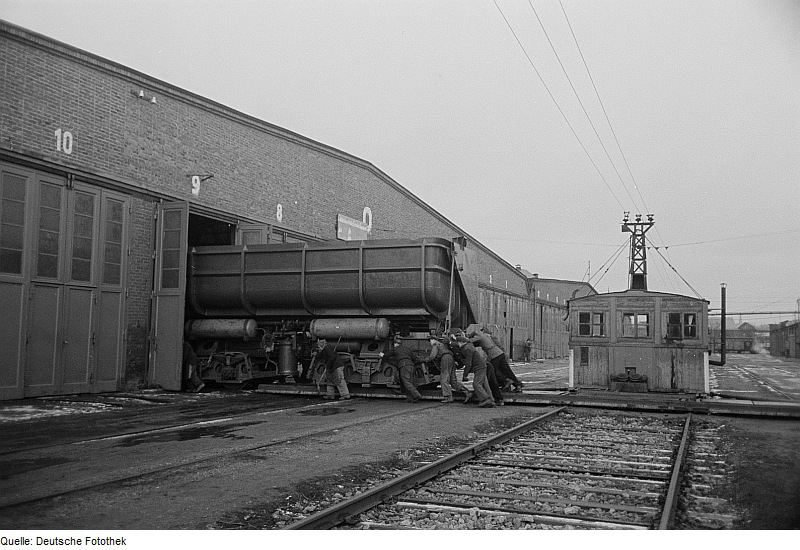 Original image description from the Deutsche FotothekEinfahrt eines Kippwaggons in eine Werkhalle